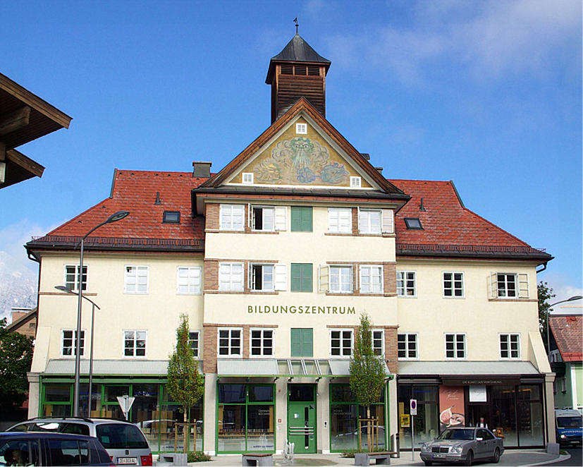 Alte Zeugstätte